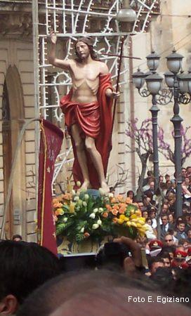 S.S Cristo con la Croce di Ispica, venerato il Venerdì Santo nella basilica della S.S. Annunziata FOTO PERSONALE Foto liberamente concessa da E.Egiziano e non protetta da copyright